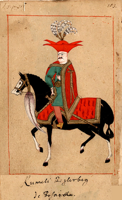 Governor, Beylerbey, of Bosnia "Rumeli Beglerbeg de Bosnia"